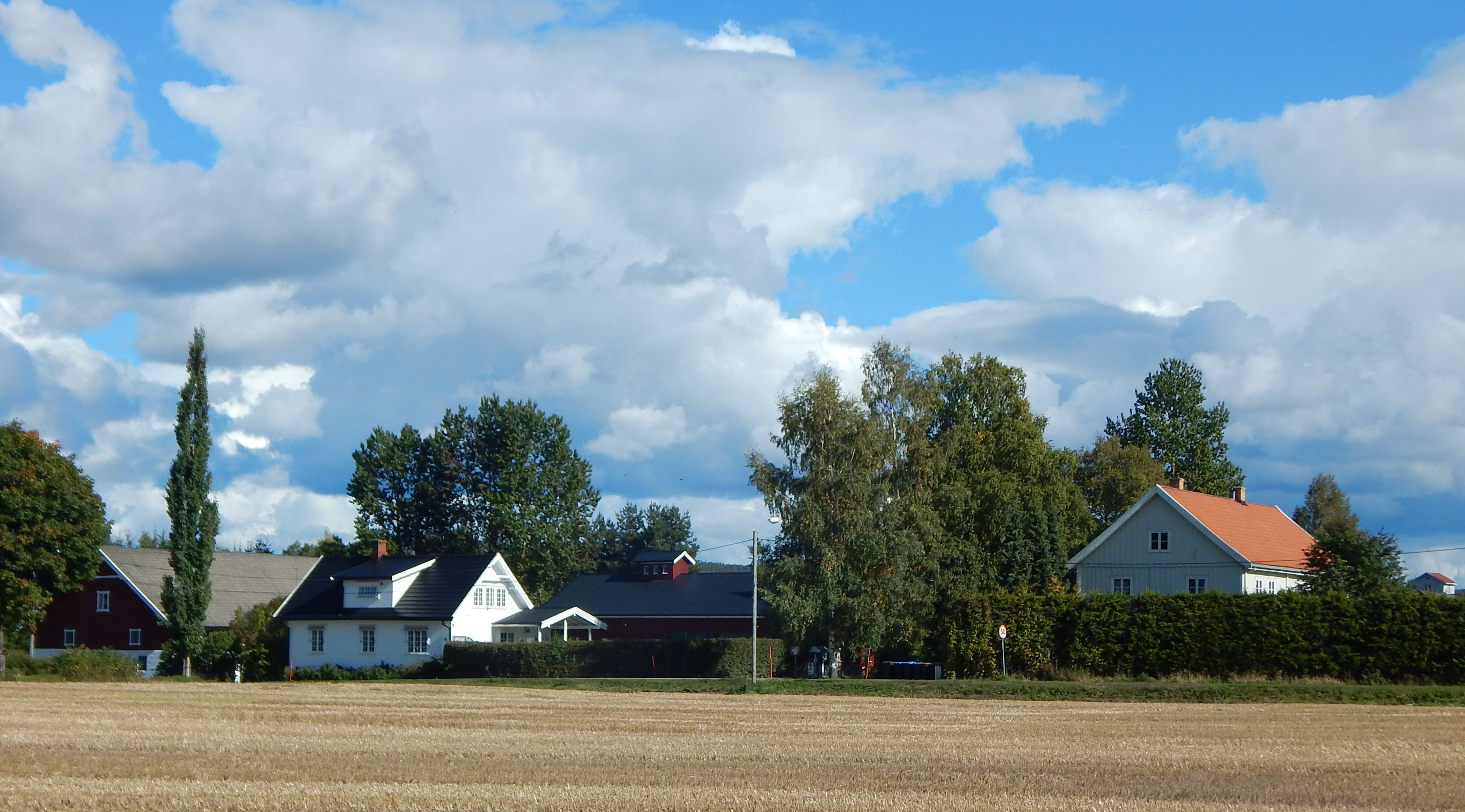 Hof prestegård sett fra kirkegården